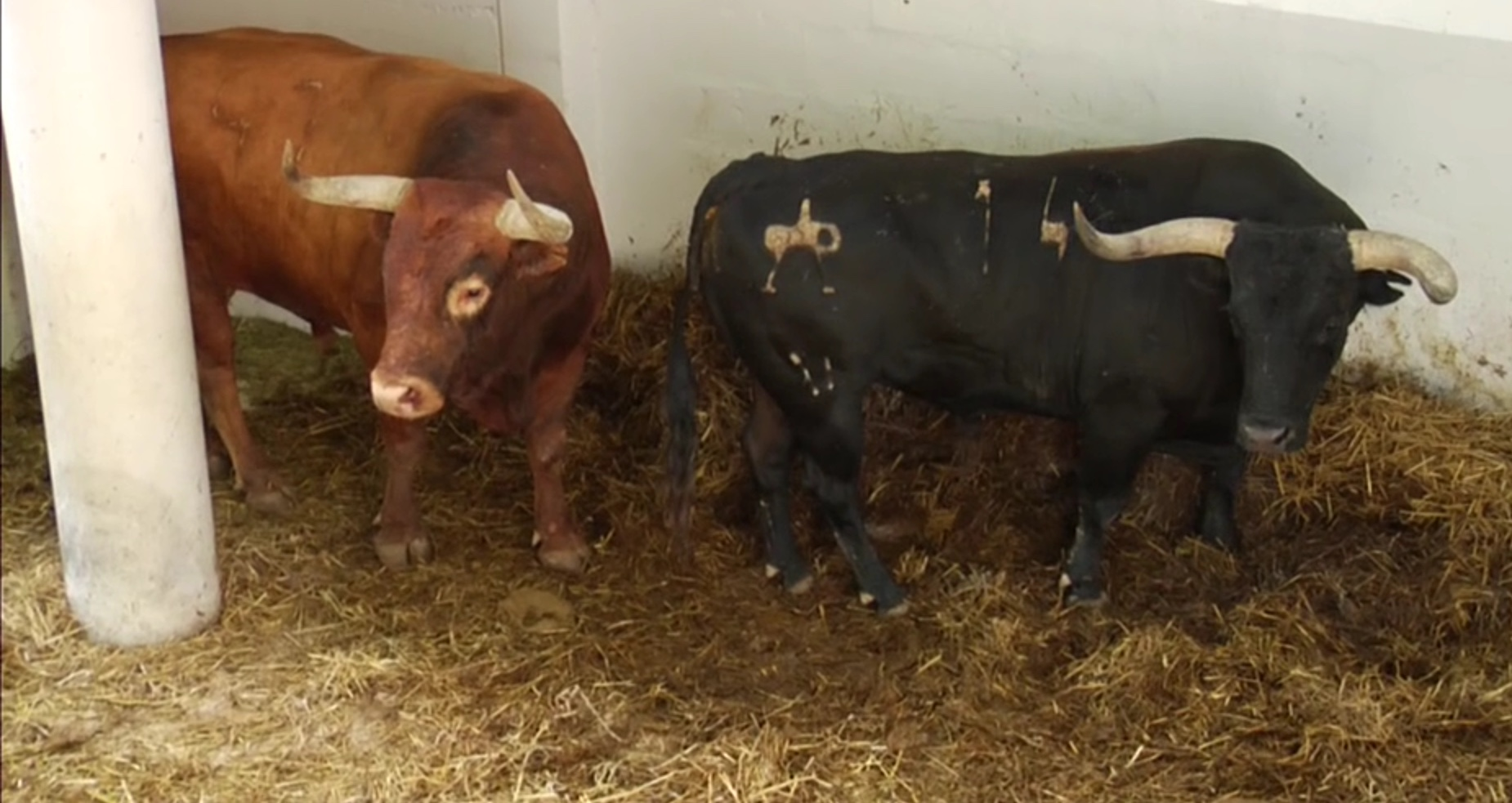 Tiros de lidia de la ganadería Miura, pinta castaña con ojos de perdíz y pinta negra